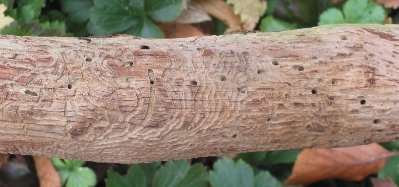 vraatbeeld van de schorskever op eik; eind oktober